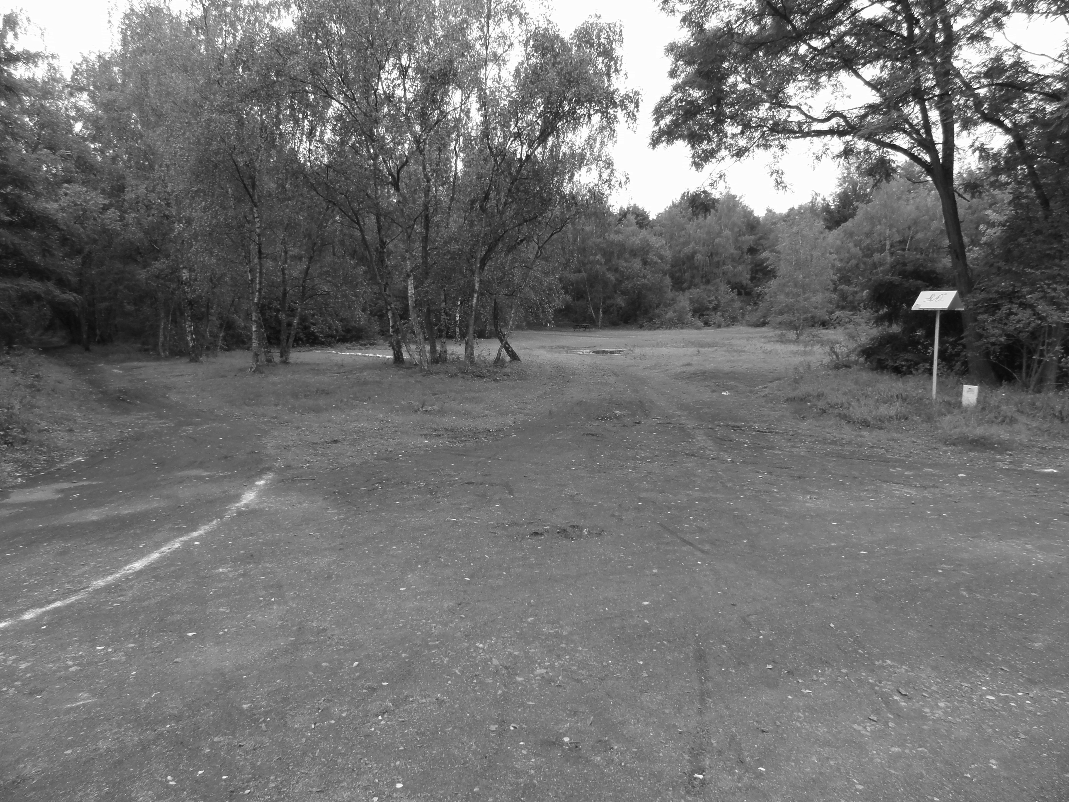 Terril n° 70D dit 3 - 4 de Meurchin marais à tanches, fosse n° 3 - 4 de la Compagnie des mines de Meurchin, Wingles, Pas-de-Calais, Nord-Pas-de-Calais, France.